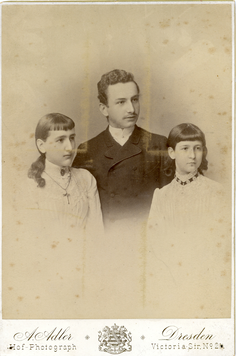 Gruppe, vielleicht Geschwister, aufgenommen von August Adler, Dresden um 1895